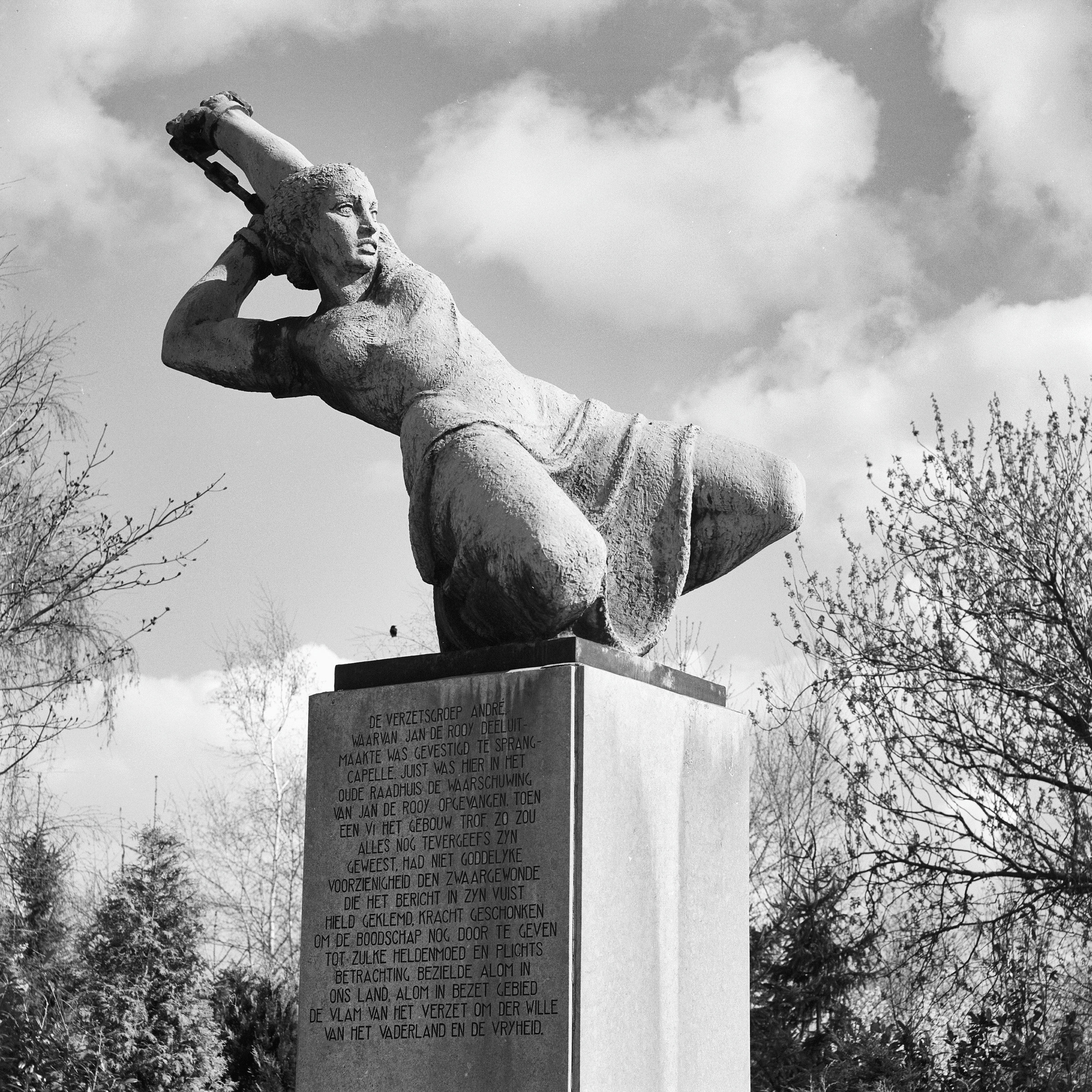 Monument Jan De Rooy: Sokkel met tekst en beeld van geketende vrouw